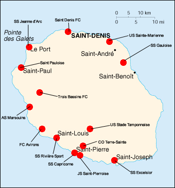 Localisation des clubs participants au championnat 2009